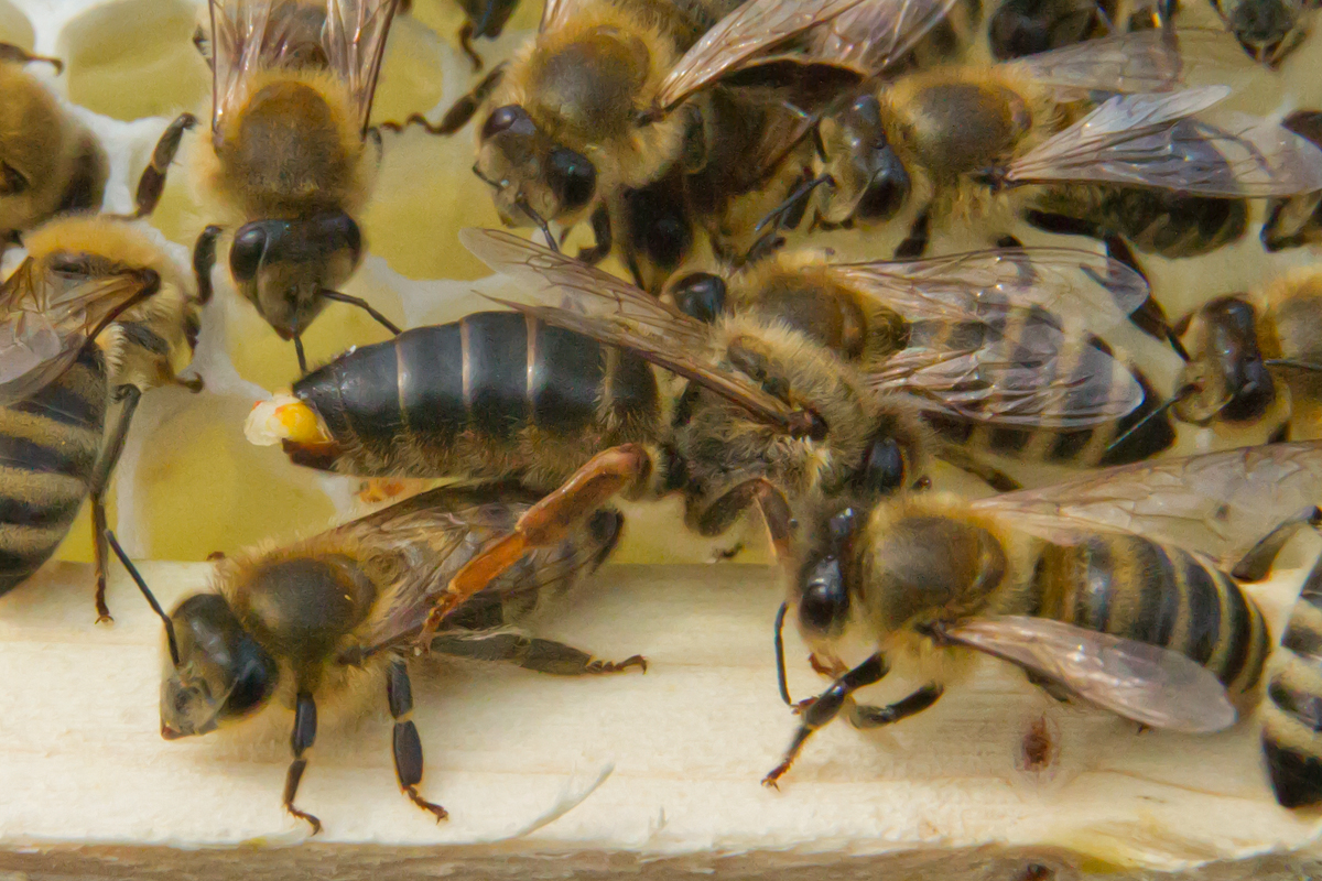 Gerade vom Hochzeitsflug zurückkehrende Königin mit abgebrochenen Geschlechtsteil des letzten Drohn